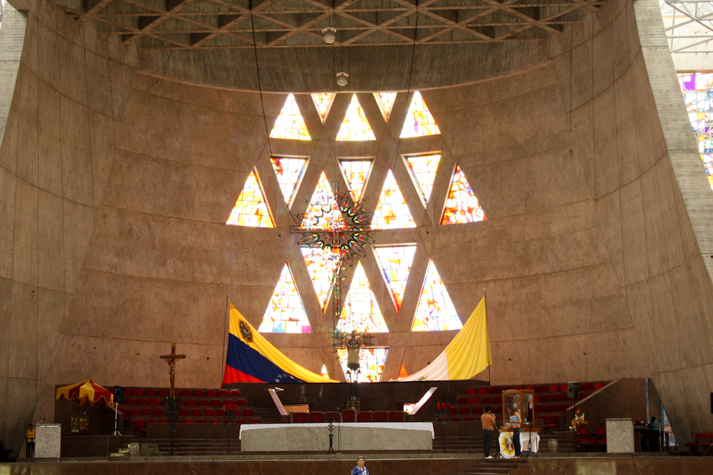 El reflejo de la luz invita a la oración